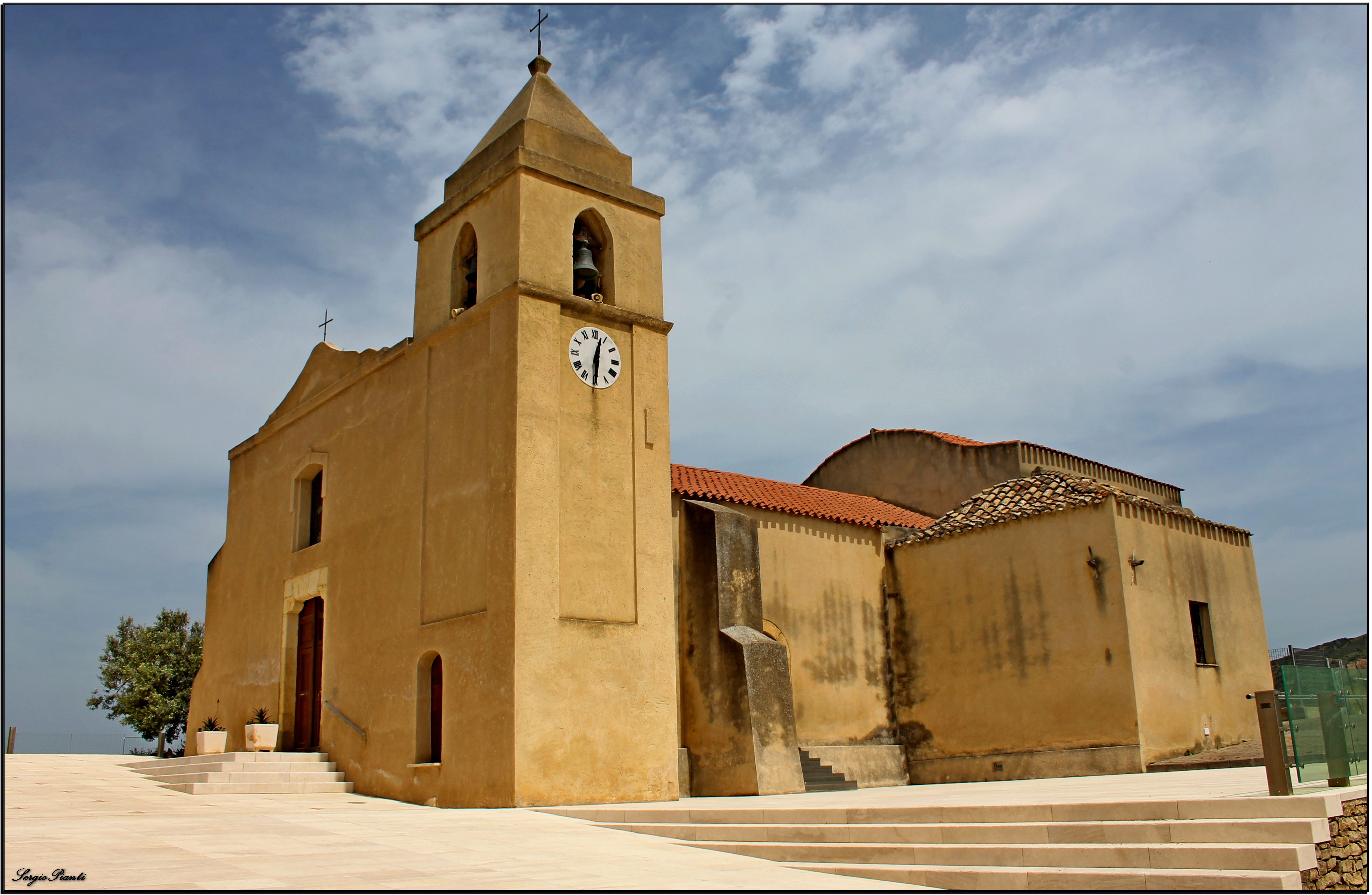 Soleminis Chiesa San Giacomo Apostolo